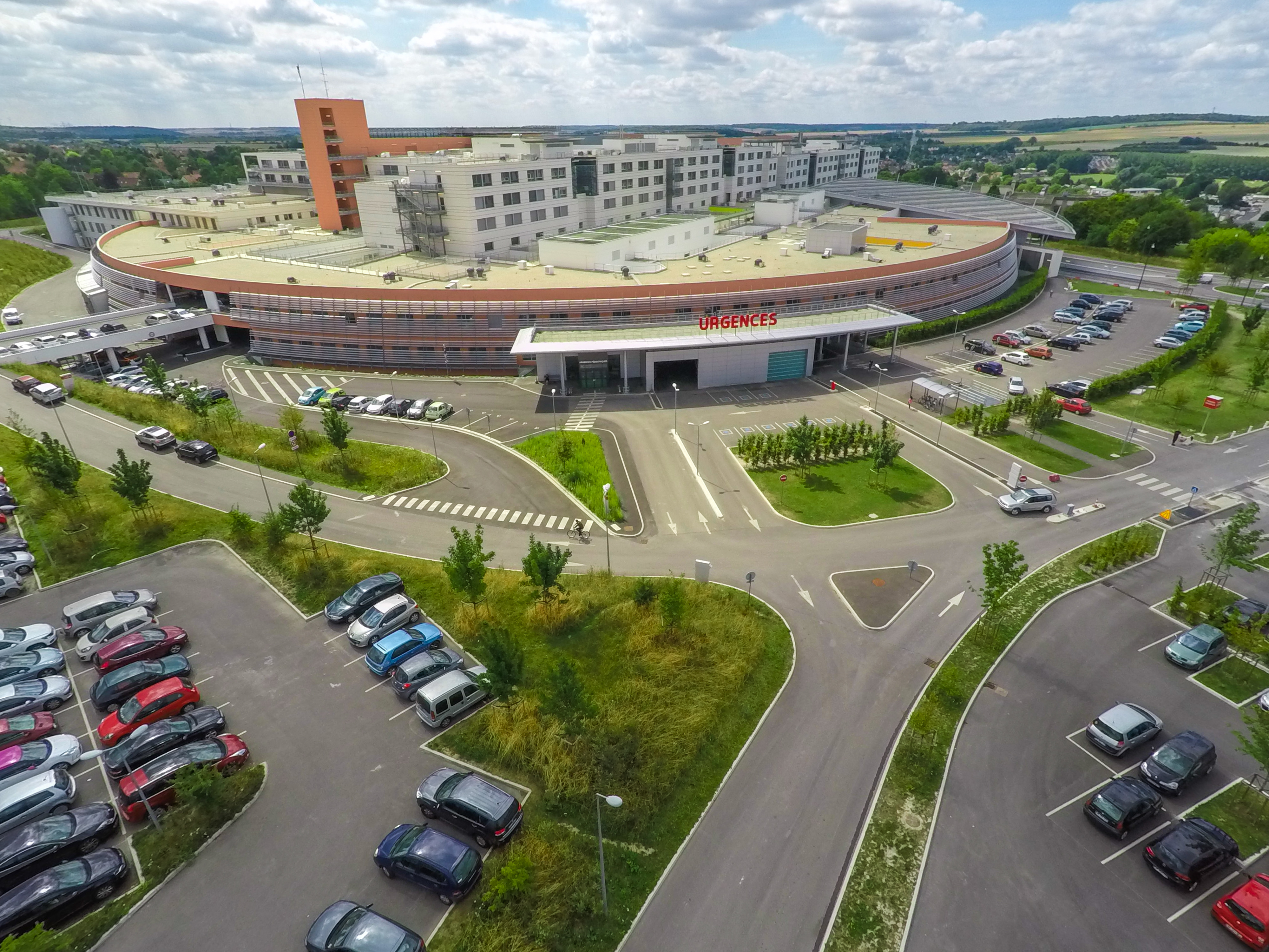 CHU-Amiens-Picardie-photo-drône